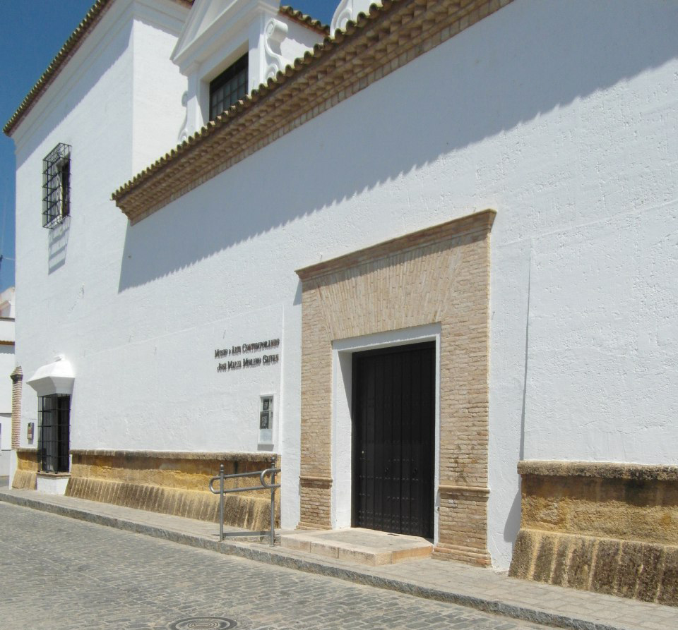 Vista de la puerta de acceso al Museo de Arte Contemporáneo José María Moreno Galván